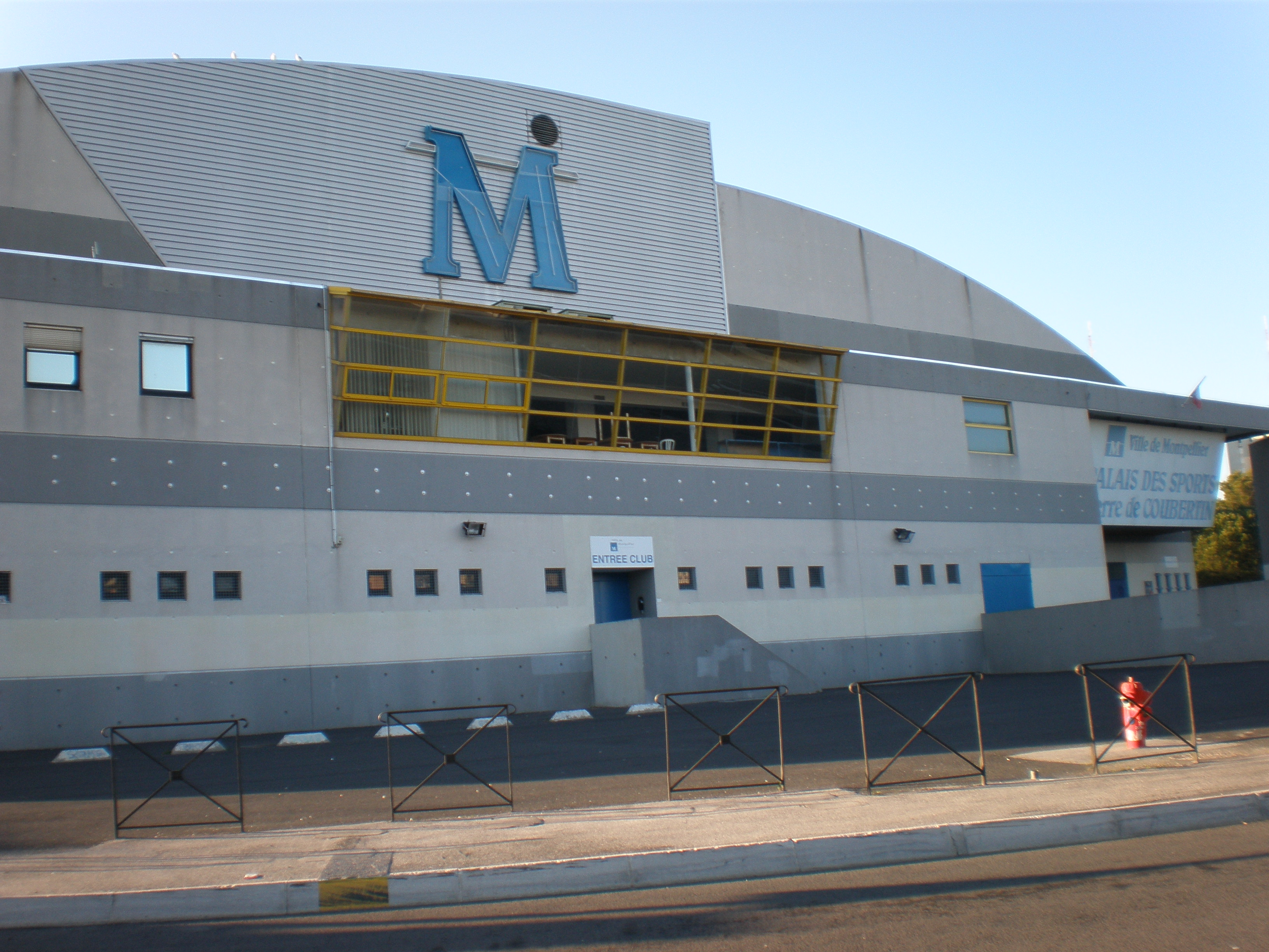 Le Palais des Sports Pierre de Coubertin à Montpellier (Hérault)